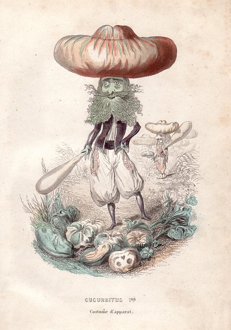 Plate by French printmaker Amédée Varin from "Drôleries végétales. L'Empire des légumes, mémoires de Cucurbitus Ier" by Eugène Nus and Antoine Méray, Paris: Gabriel de Gonet, 1861.